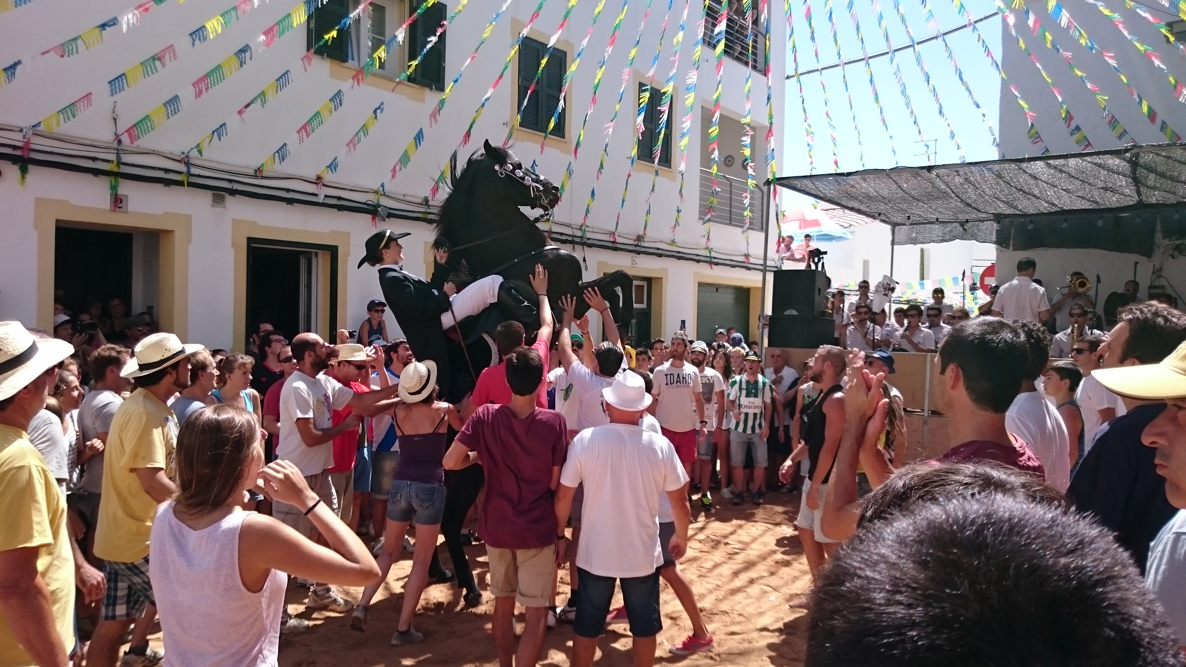 Festes des Migjorn Gran, en honor a sant Cristòfol de ses Corregudes This is a photography of a Folklore festival in Spain (Wikidata id Q23662660).